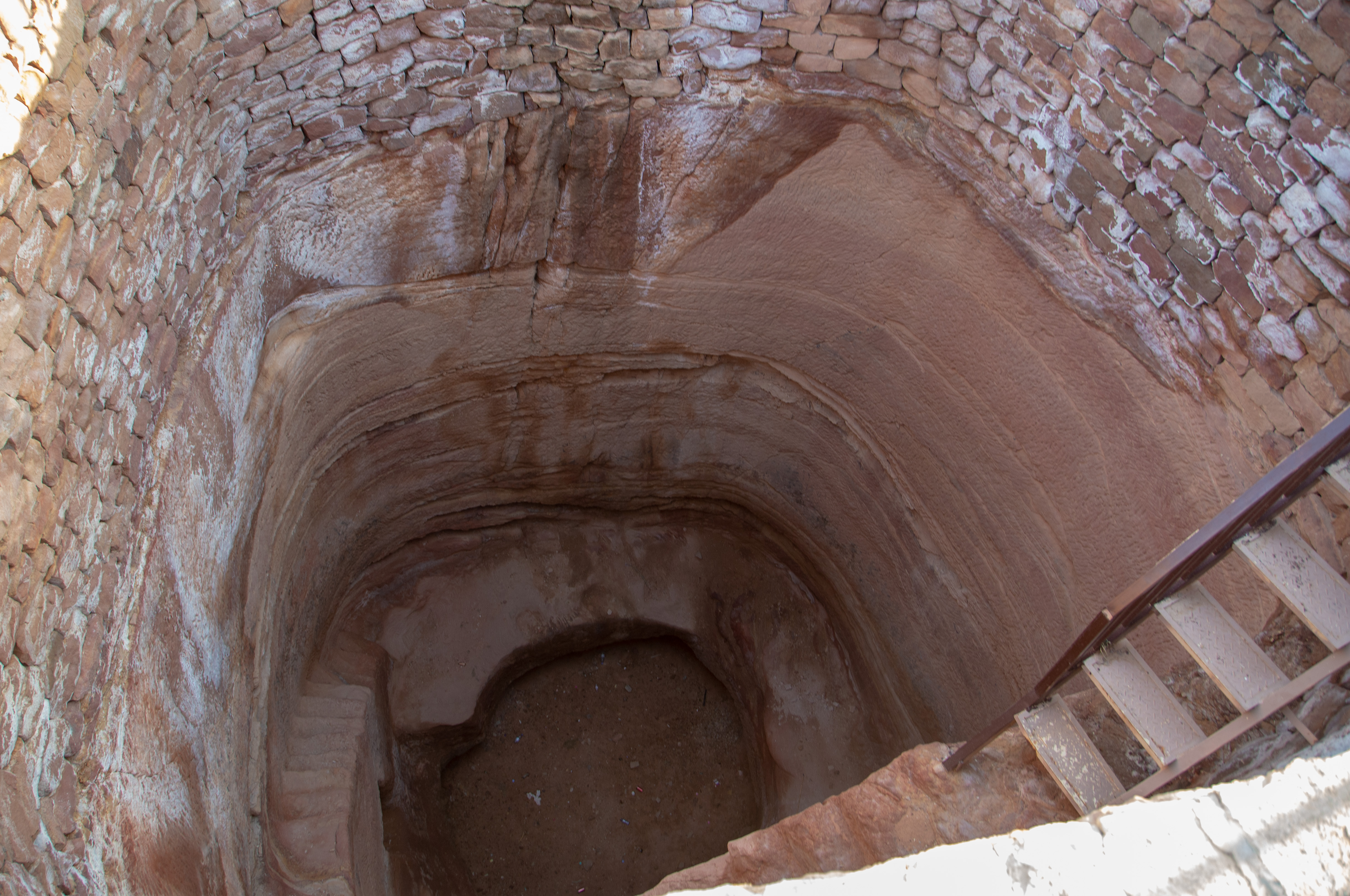 بئر سيسرا